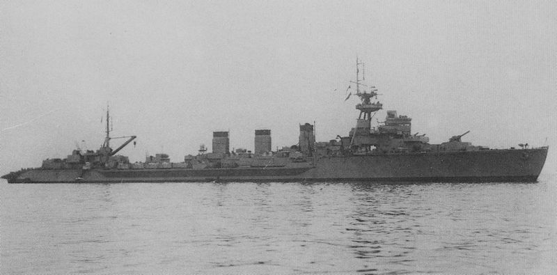 日本海軍 球磨型二等巡洋艦 『北上』